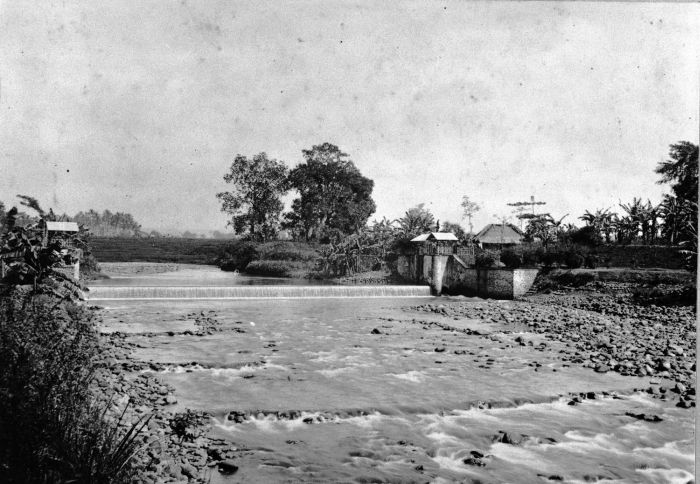 Foto. Dam in de Peloes-rivier bij dessa Ardja, boven Kedjawar, in het district Poerwokerto, Midden-Java